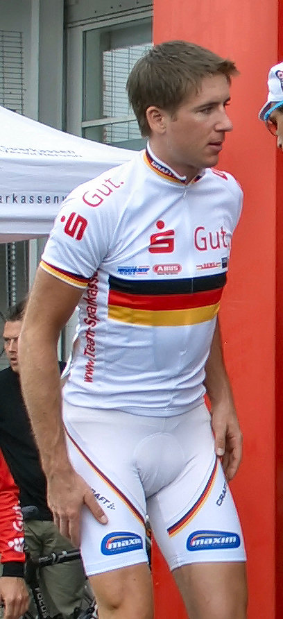 Dirk Müller at race in Germany